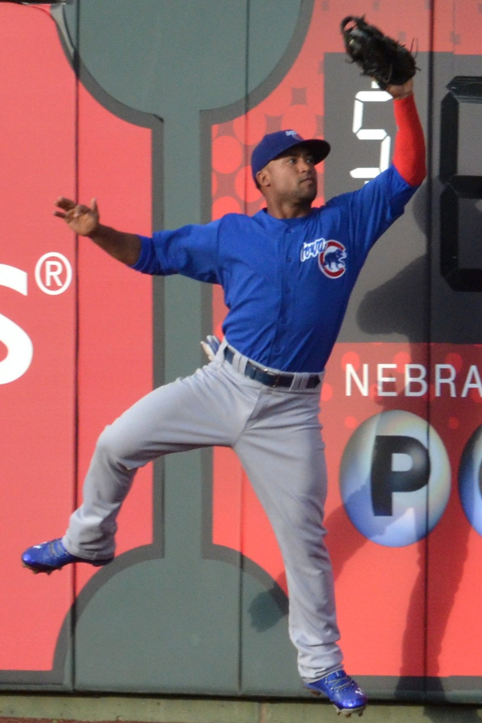 Dave Sappelt